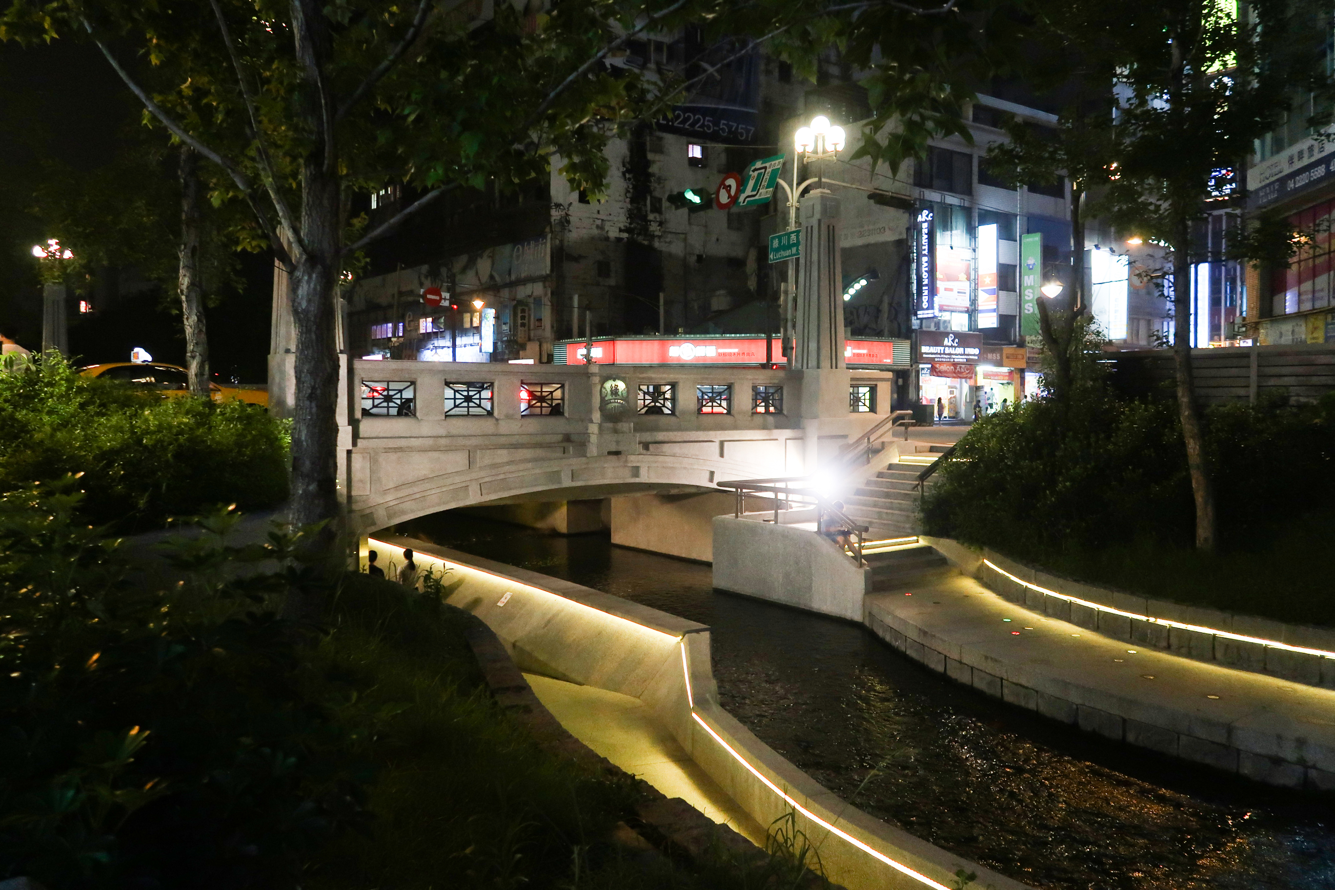 櫻橋